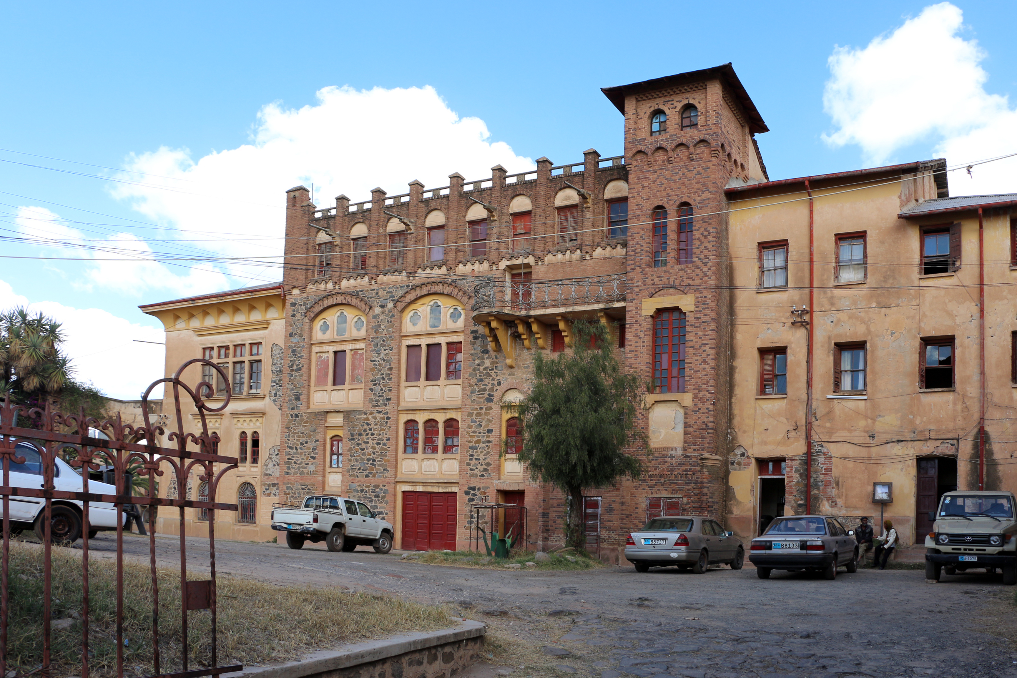 Asmara, teatro d'opera, 03.JPG